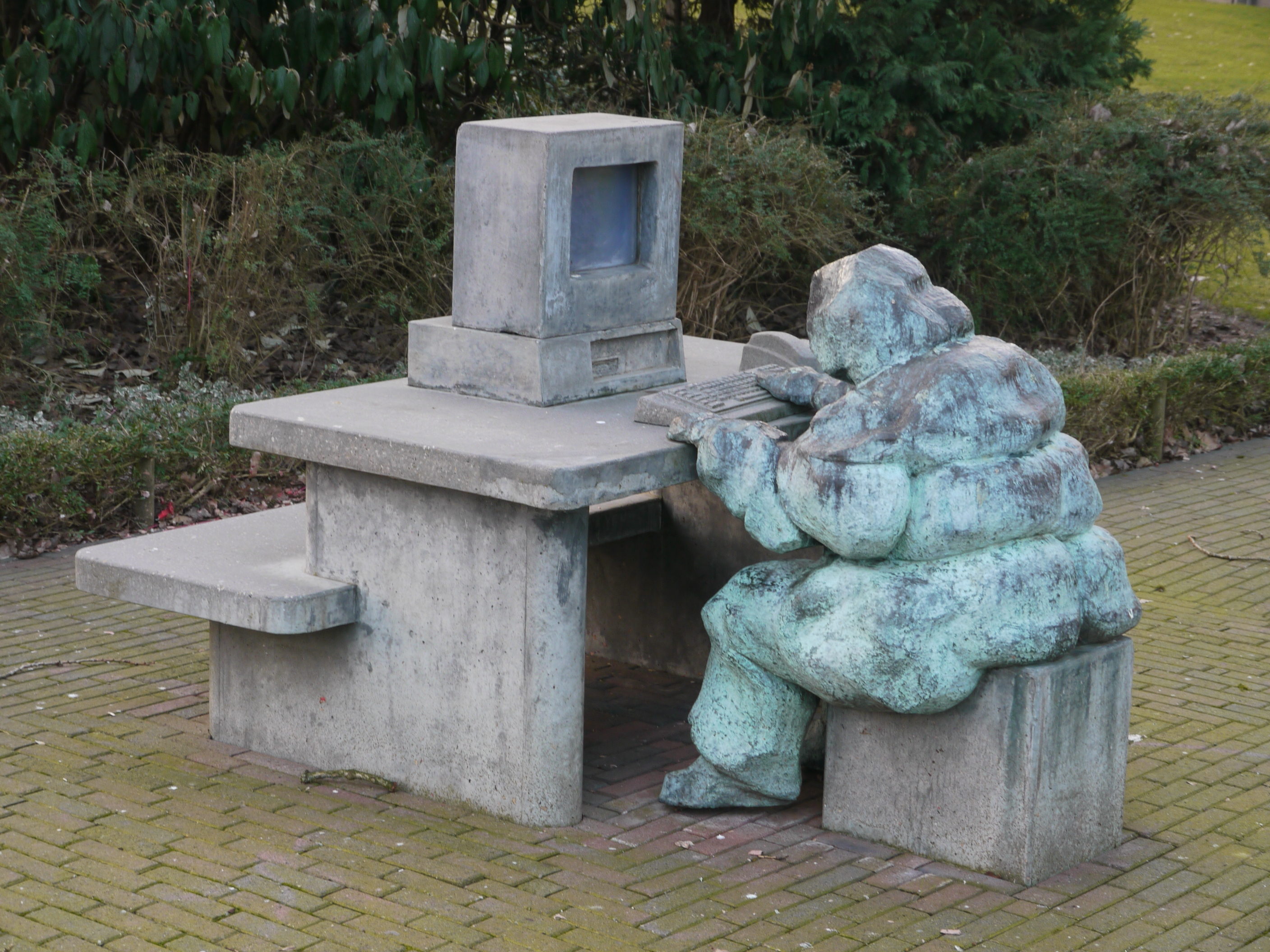 'De Hardwerker': kunstwerk door Helen Frik.